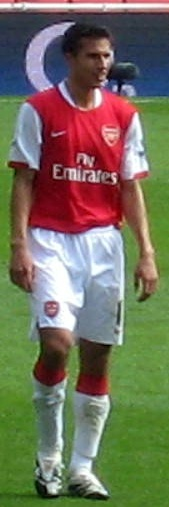 Robin van Persie